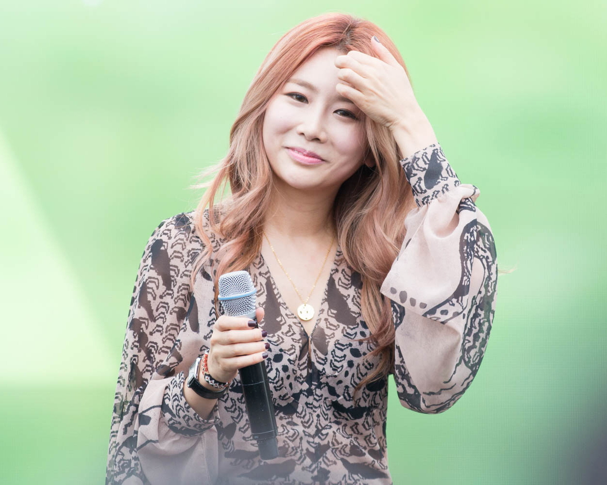 (2016.09.11)멜로디포레스트캠프 제아님 가인님 직찍 by곰탱유